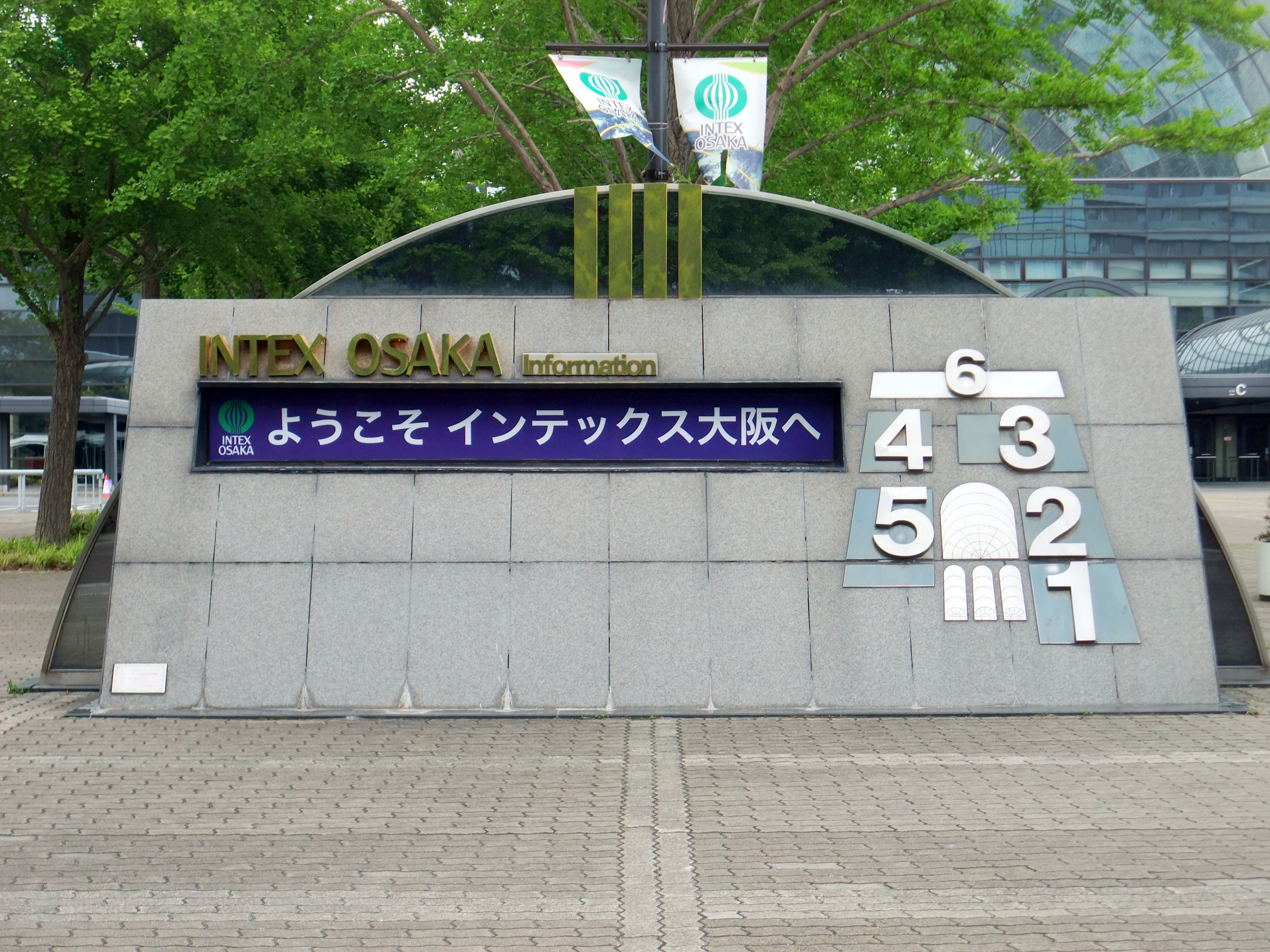 大阪国際見本市会場 案内板